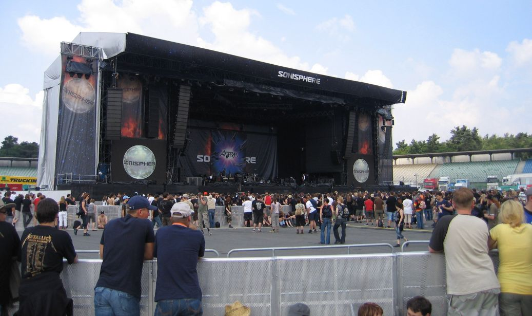 Wellenbrecher beim Sonisphere-Festival auf dem Hockenheimring